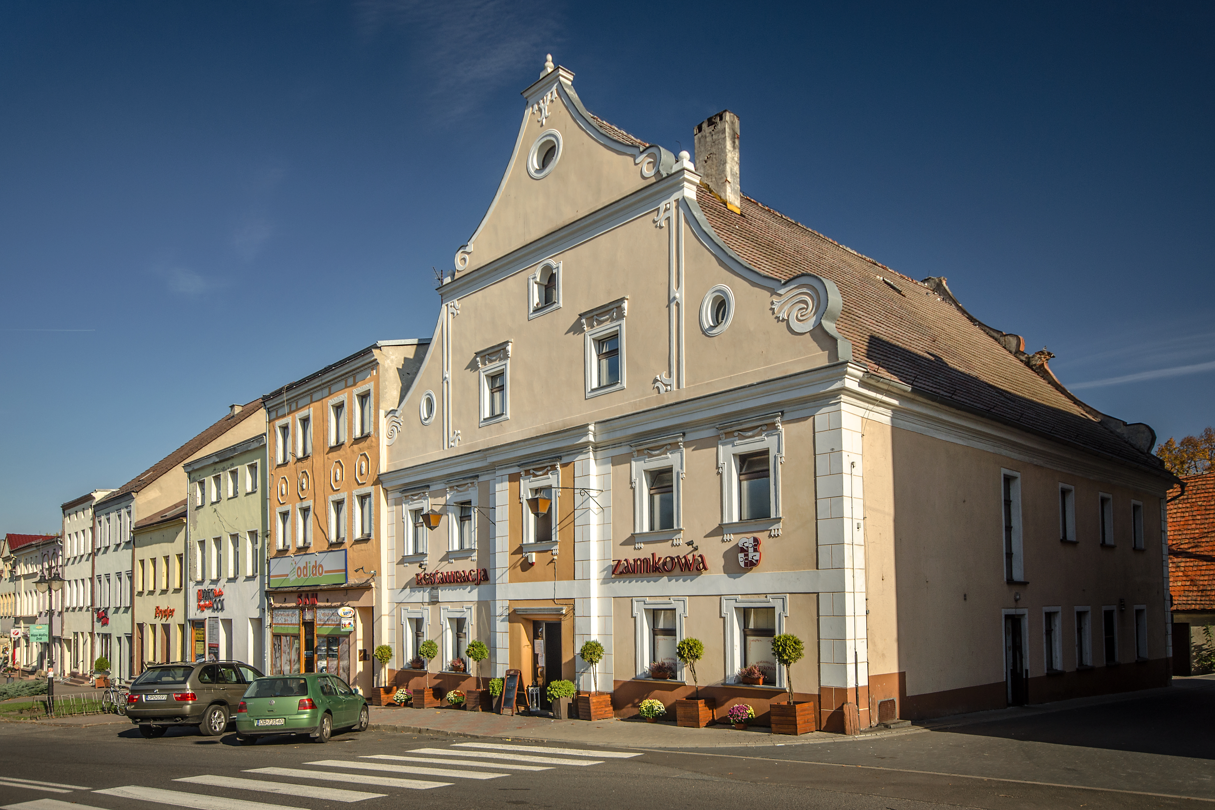 Prószków, dom, ob. restauracja, XVIII, XX